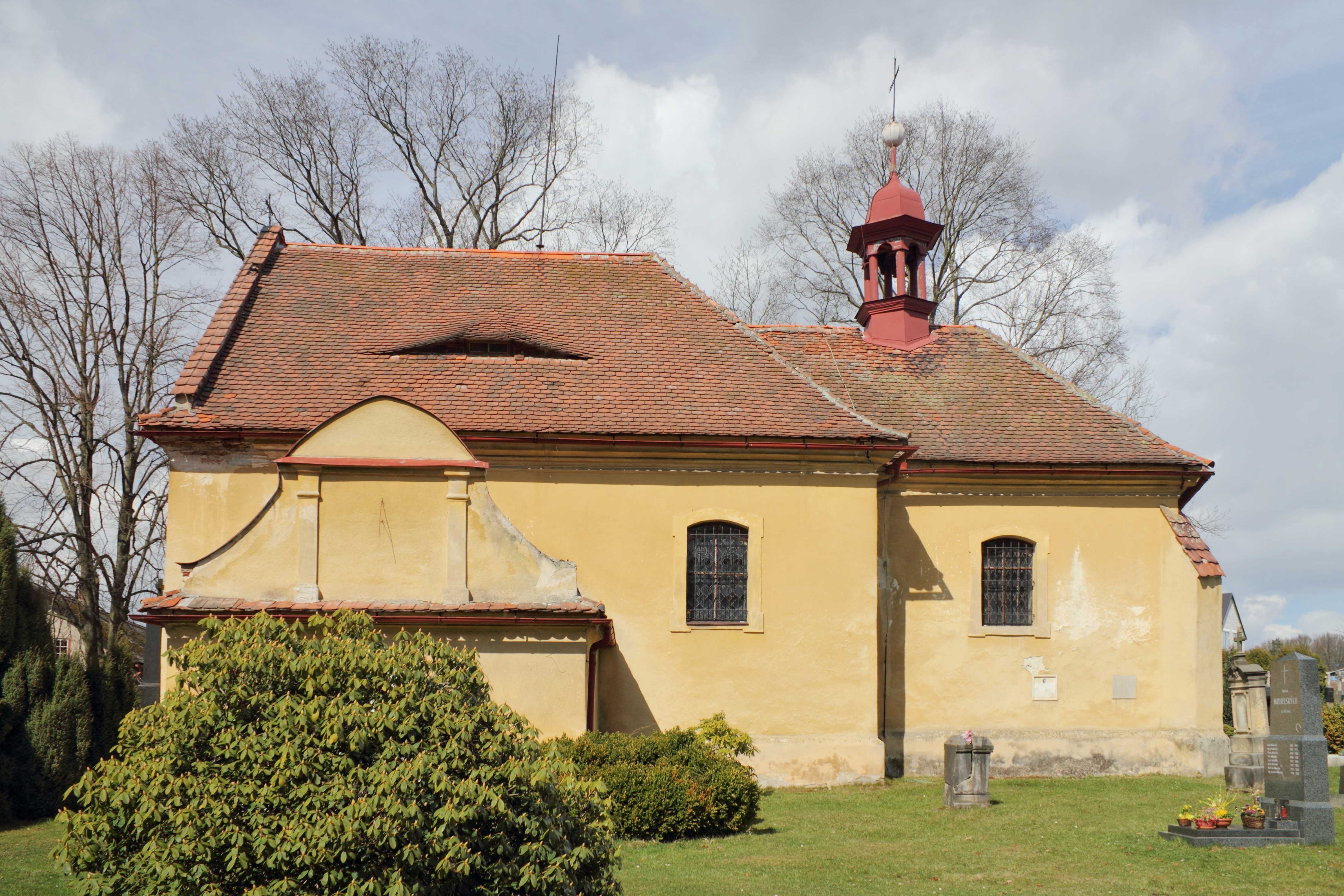 Kostel sv. Kateřiny od jihu, Vlastibořice